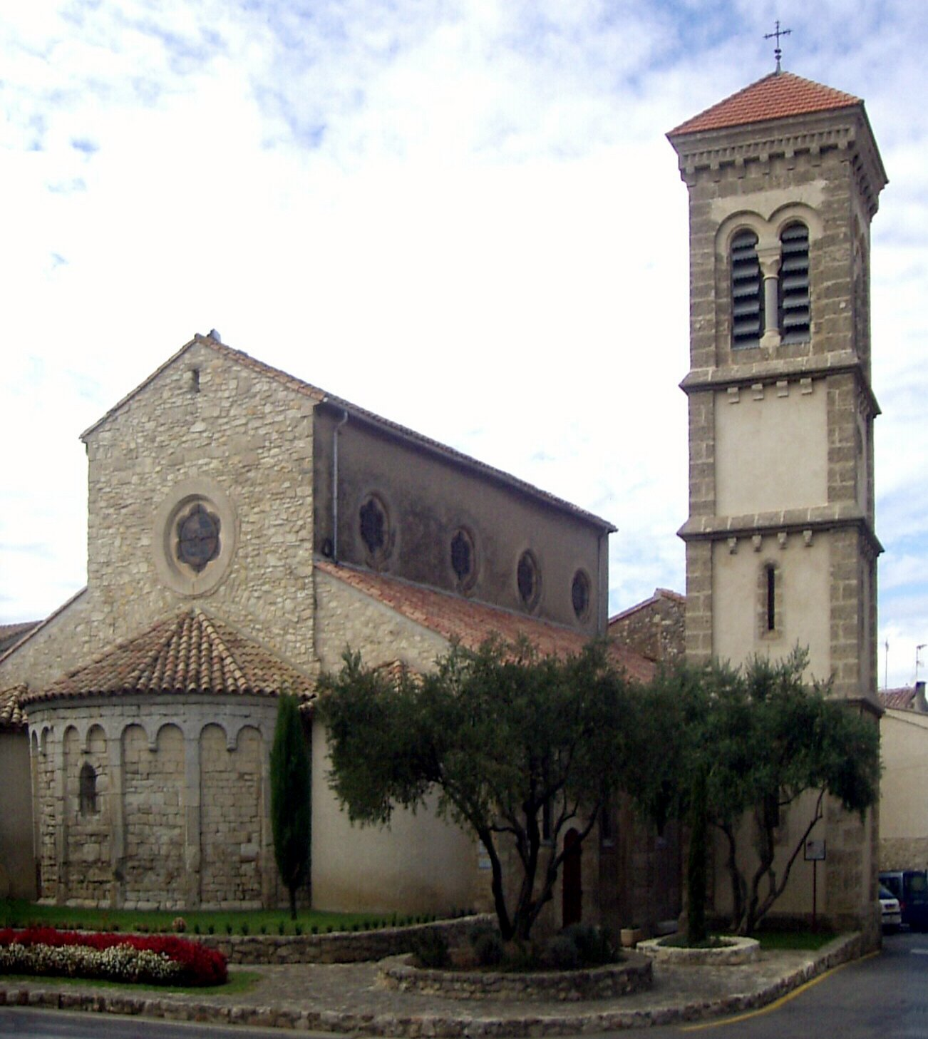 L'église Saint-Martin à Vinassan